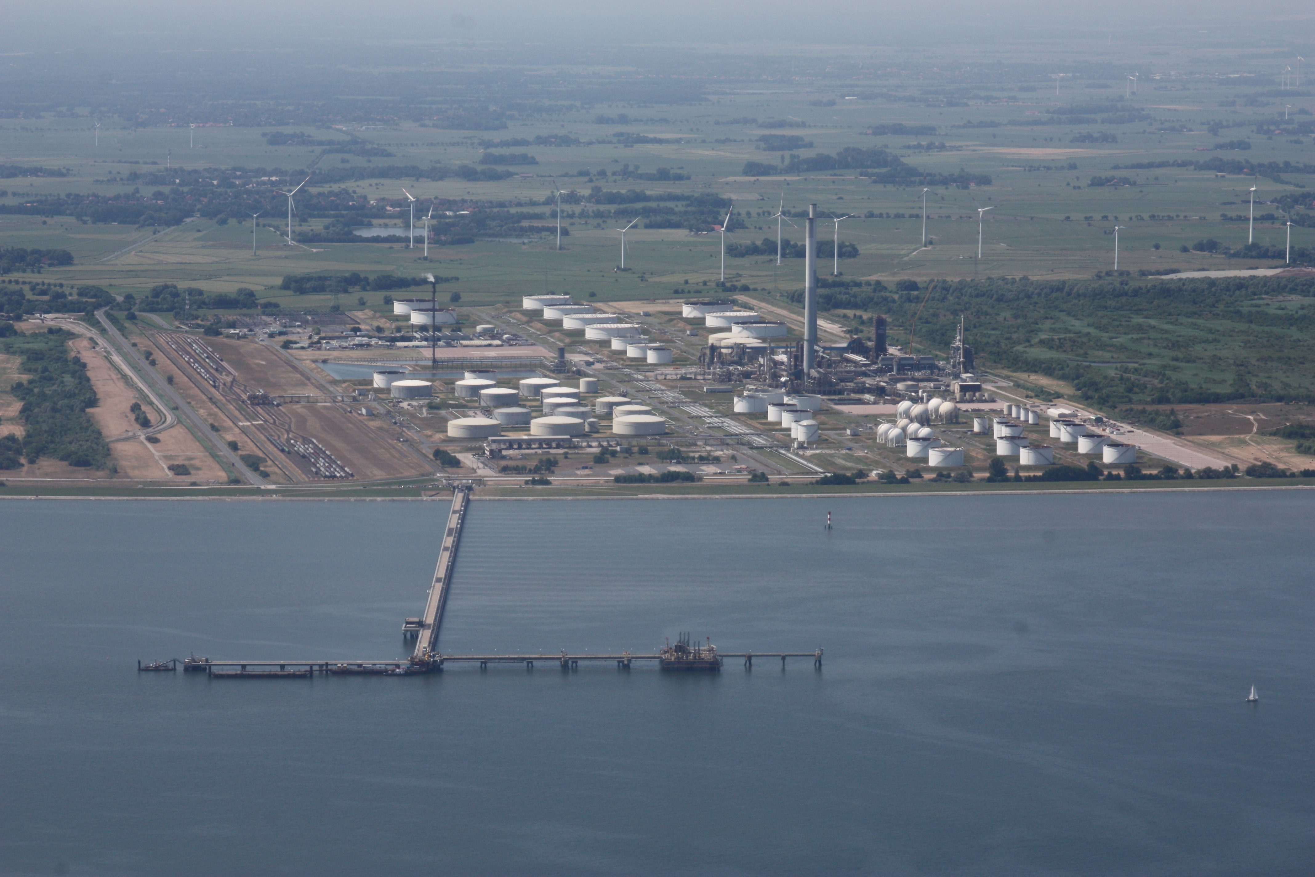 Flug über den Jadebusen und Wilhelmshaven, von Nord nach Süd; weiter nachOldenburg; Flughöhe 500 m = 1500 ft; Juli 2010